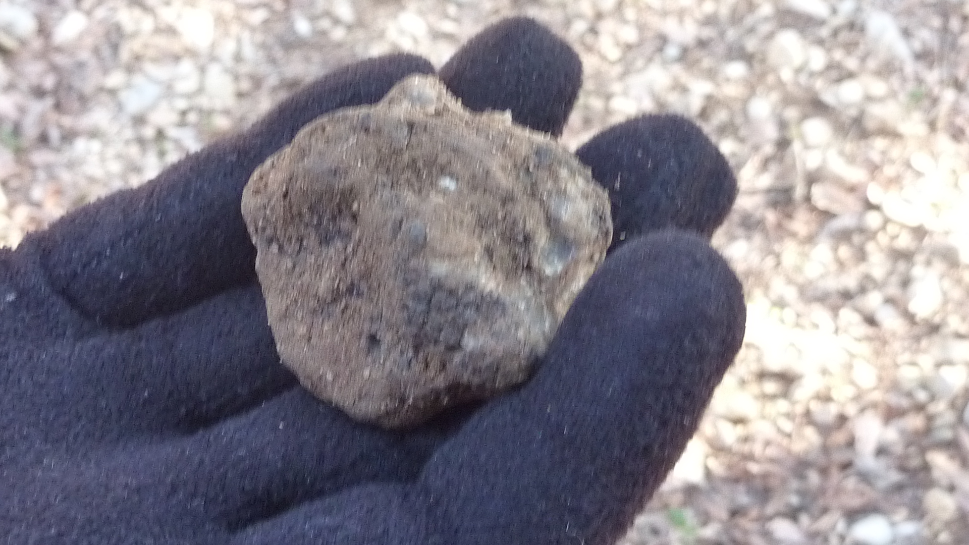 Une mélano le diamant noir